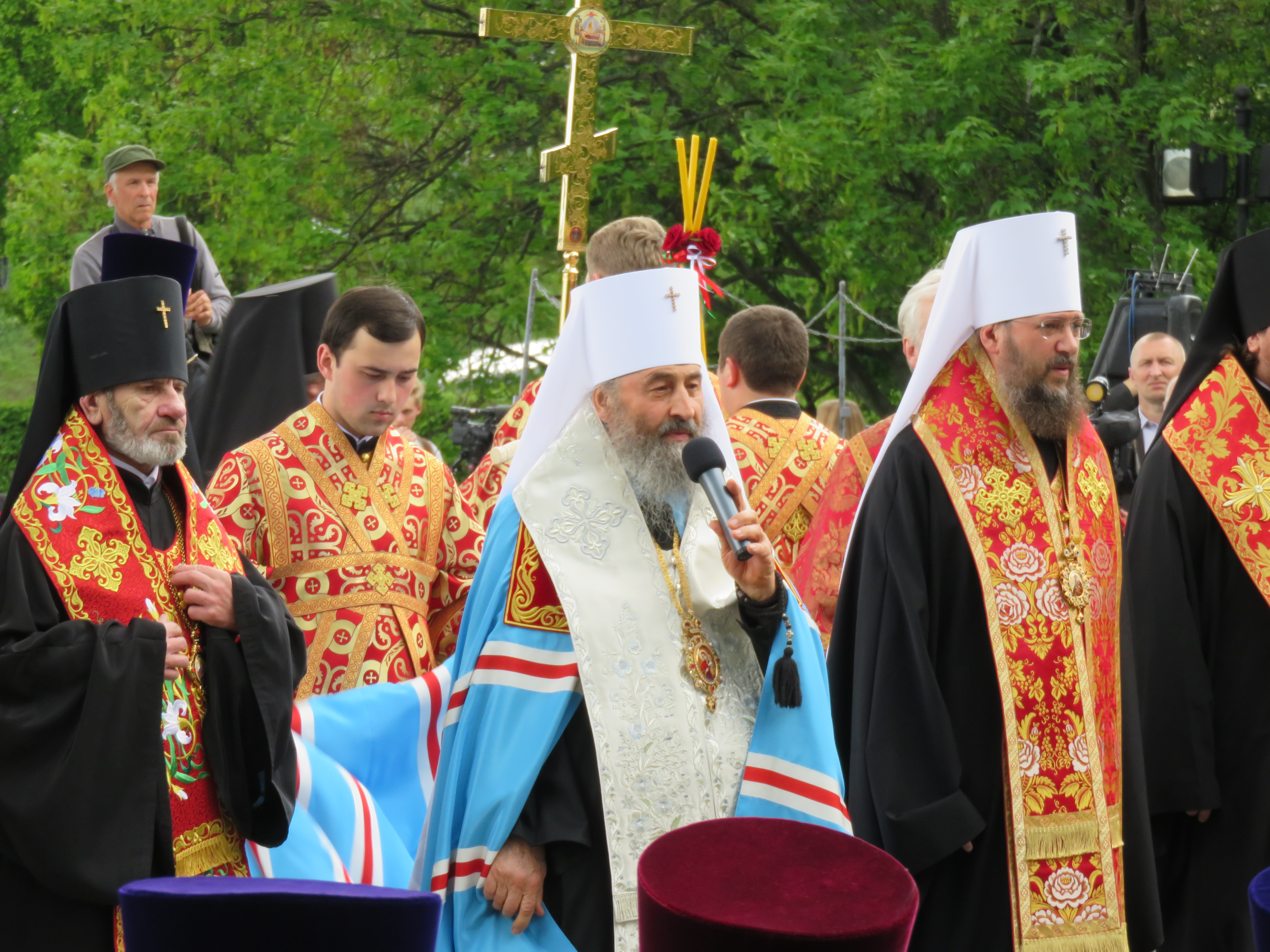 Митрополит Онуфрій (Березовський) під час молебню 8 травня 2016 у Парку Слави